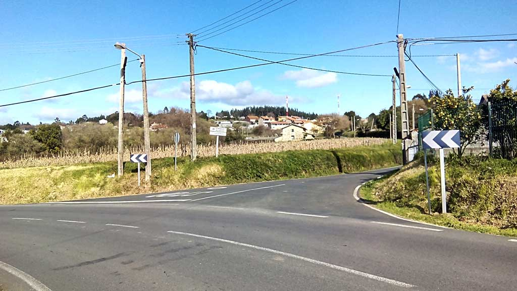 Vista de Forxas, Narón.